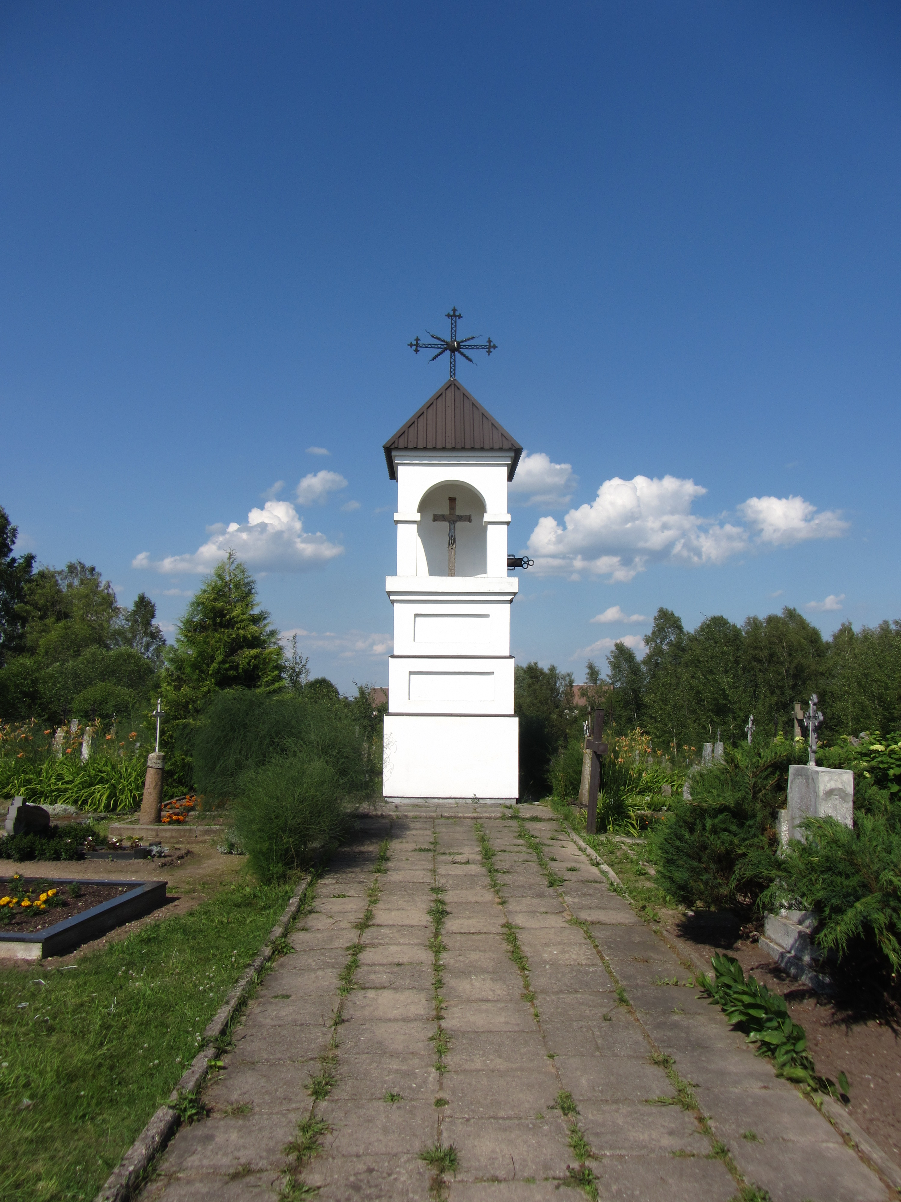 Jakeliai 18288, Lithuania